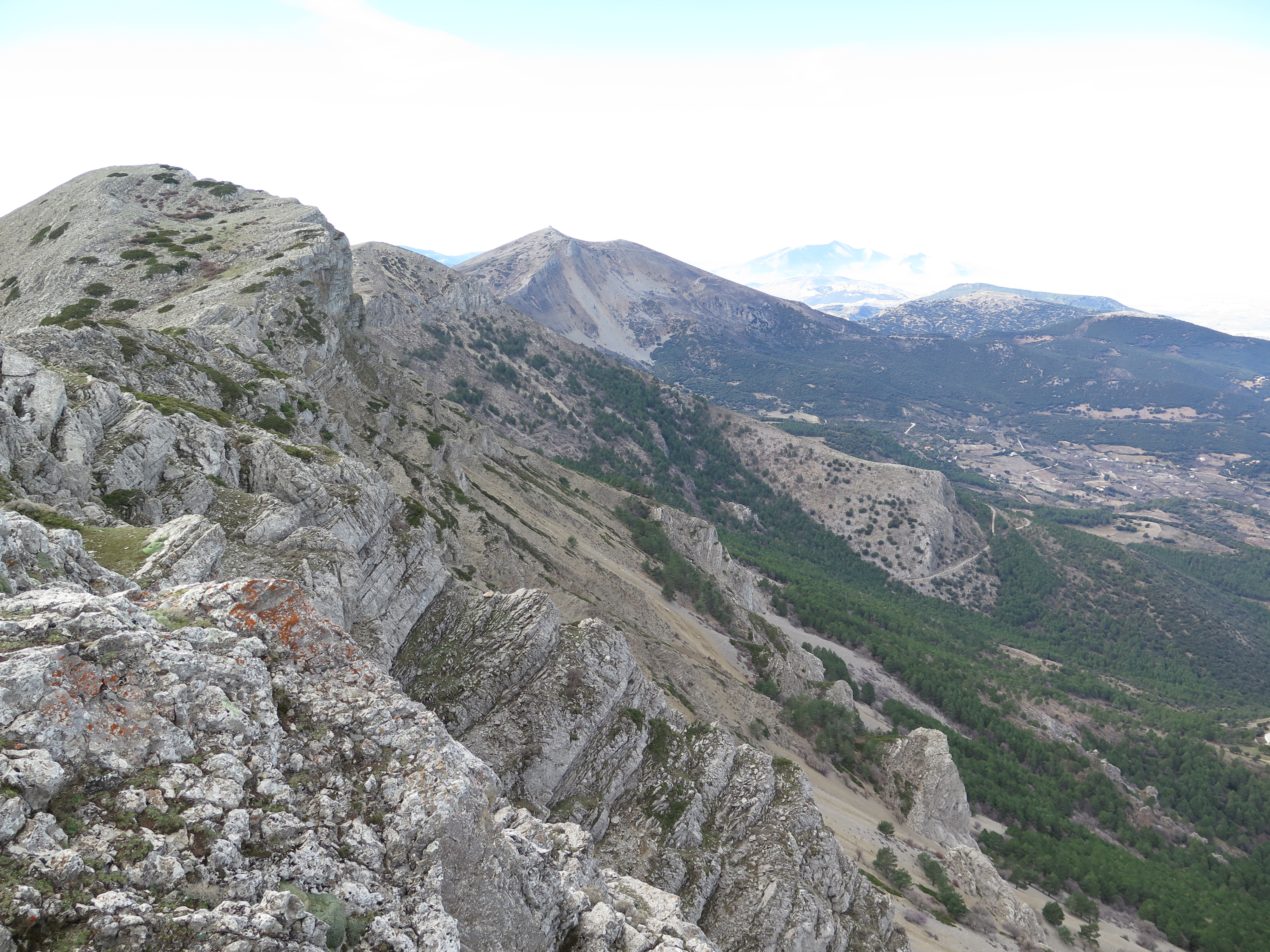 Vista del cerro Cárceles en primer término, y del cerro Almadén al fondo.